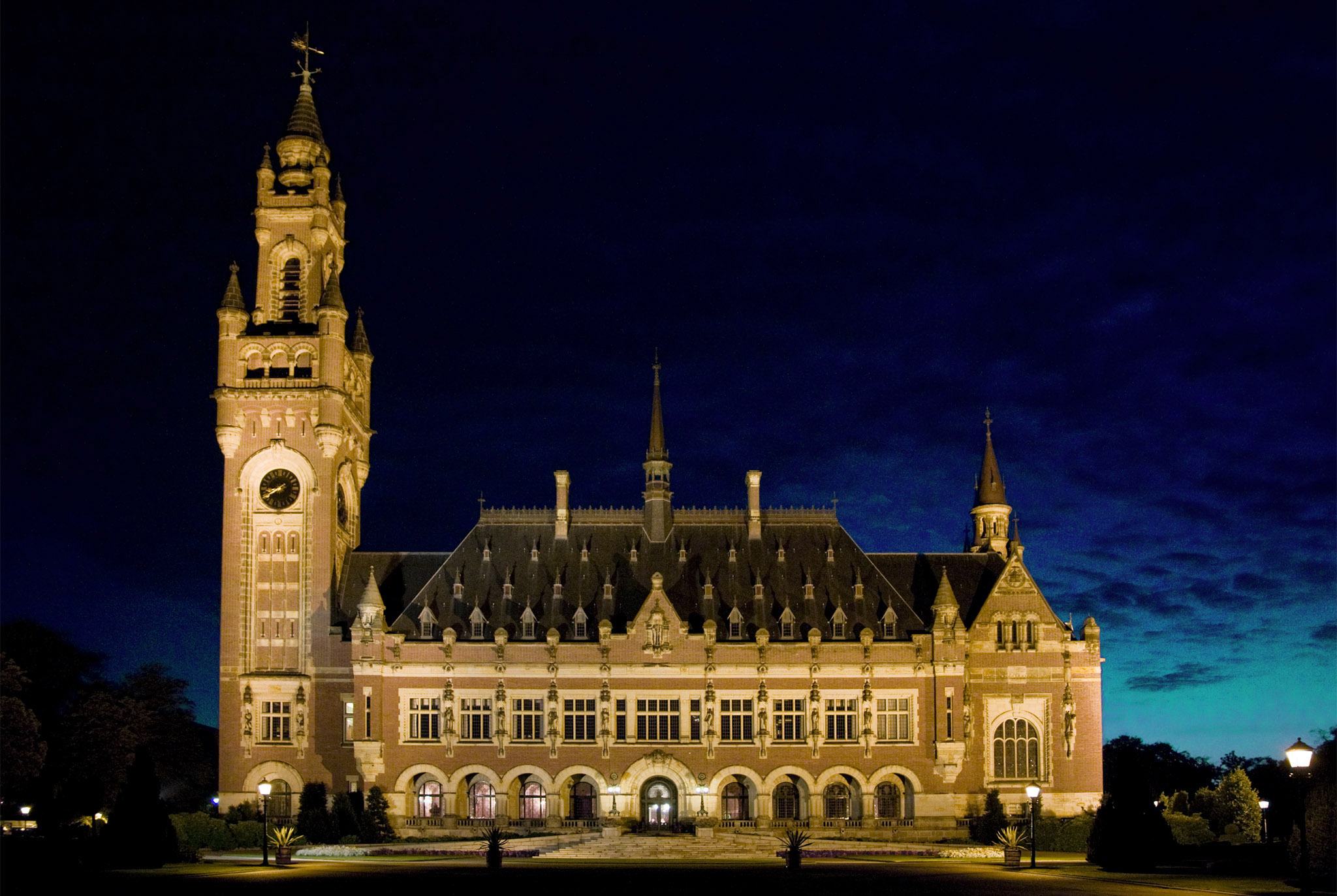 Vue de façade de devant du Palais de la Pays à La Haye - Vredespaleis - (Pays-Bas)